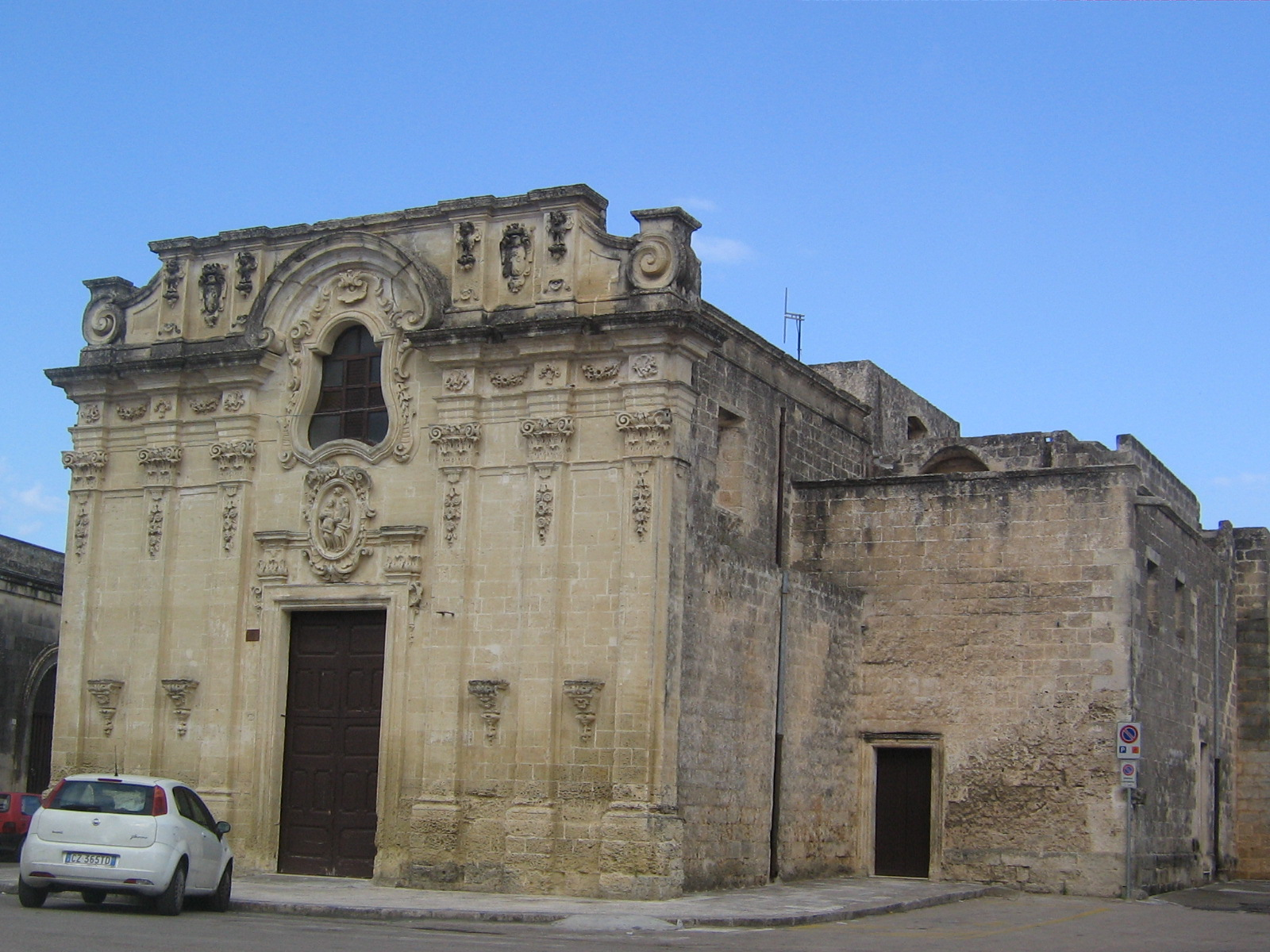 Castri di Lecce Chiesa della Visitazione